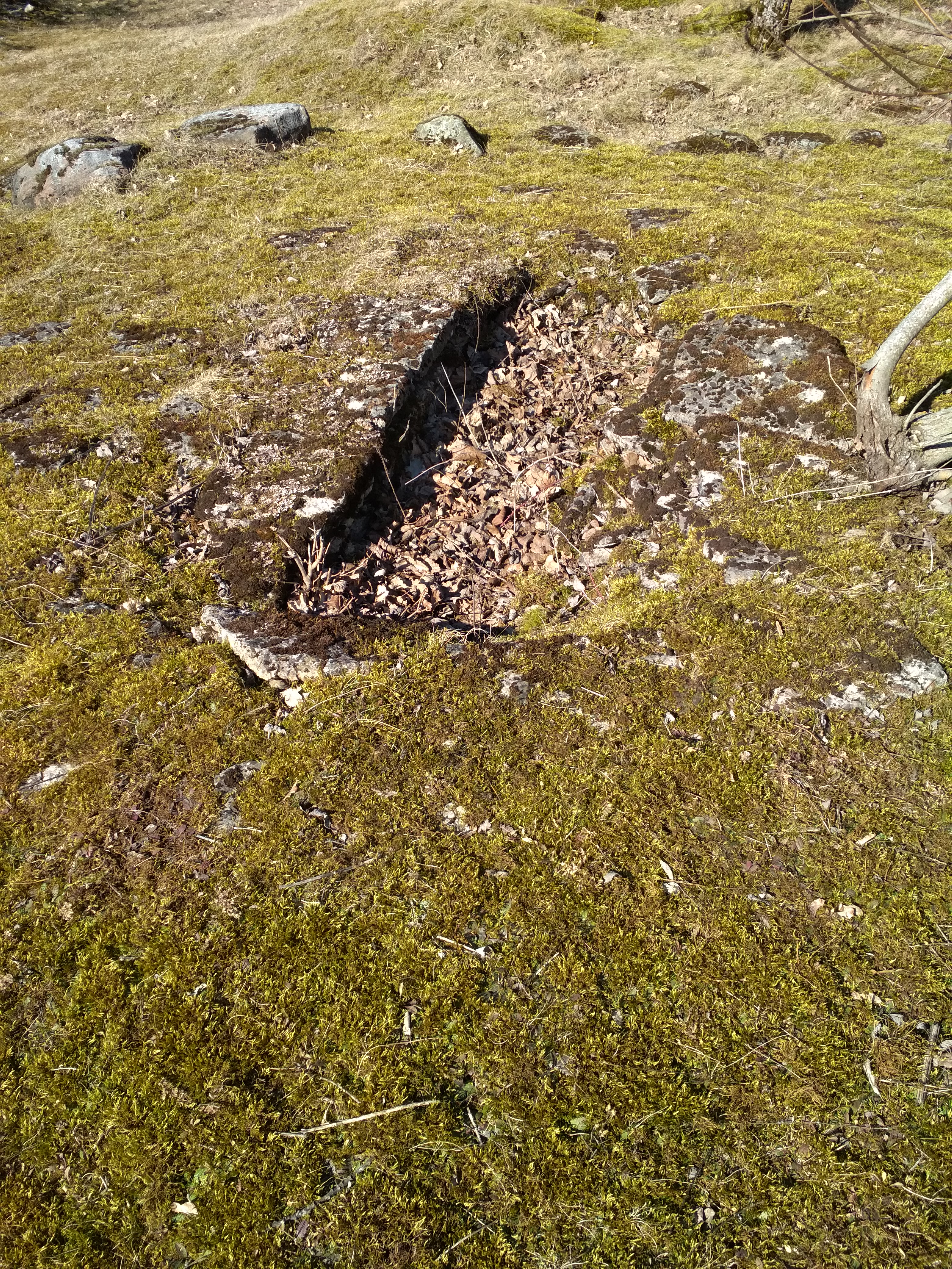 Taastatud kivikirstkalme Proosa kalmerühmas (Loo alevik)